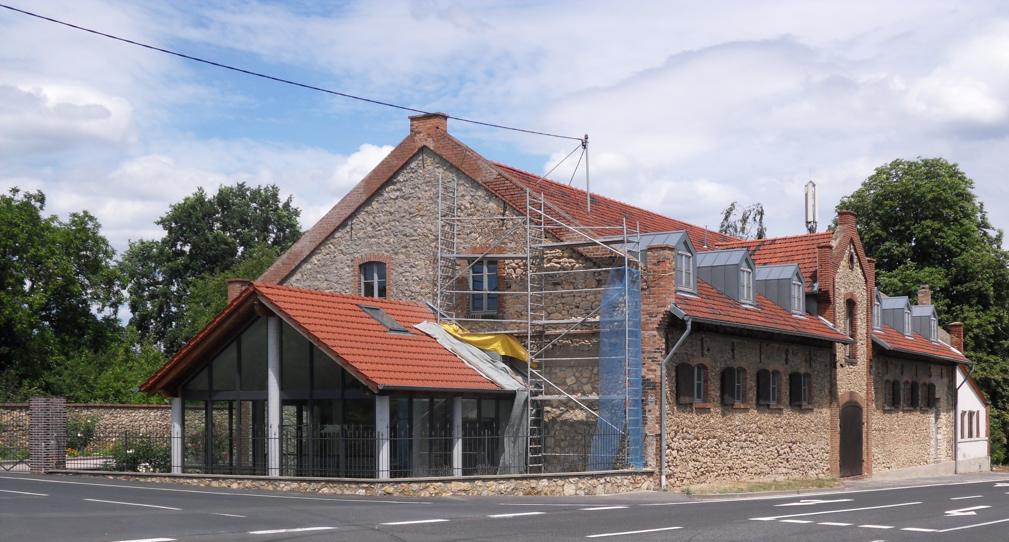 Das 1883 errichtete Hauptgebäude der ehemaligen Sektkellerei Falkenberg bei Flörsheim. Hier ist die Abfahrt von der Landesstraße zwischen Flörsheim und Hochheim zum Stadtteil Falkenberg/Keramag